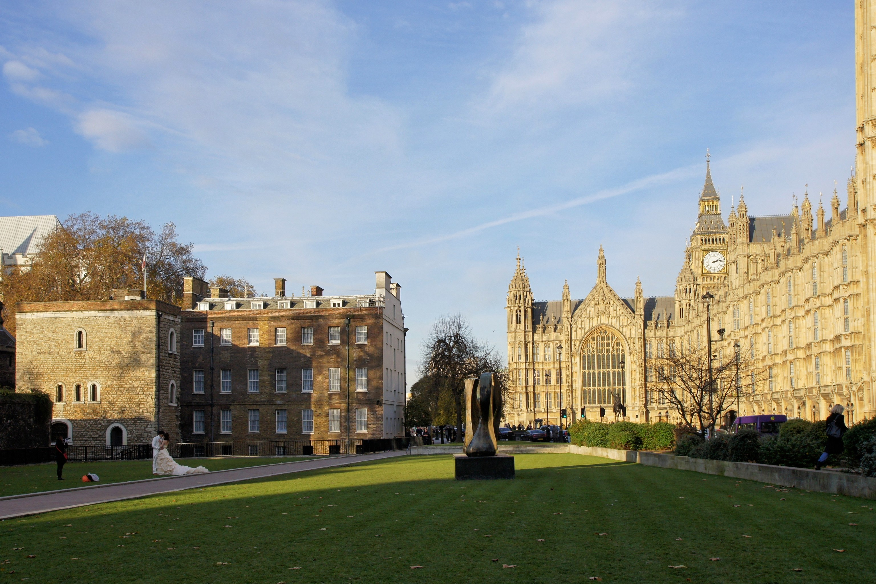 Londres